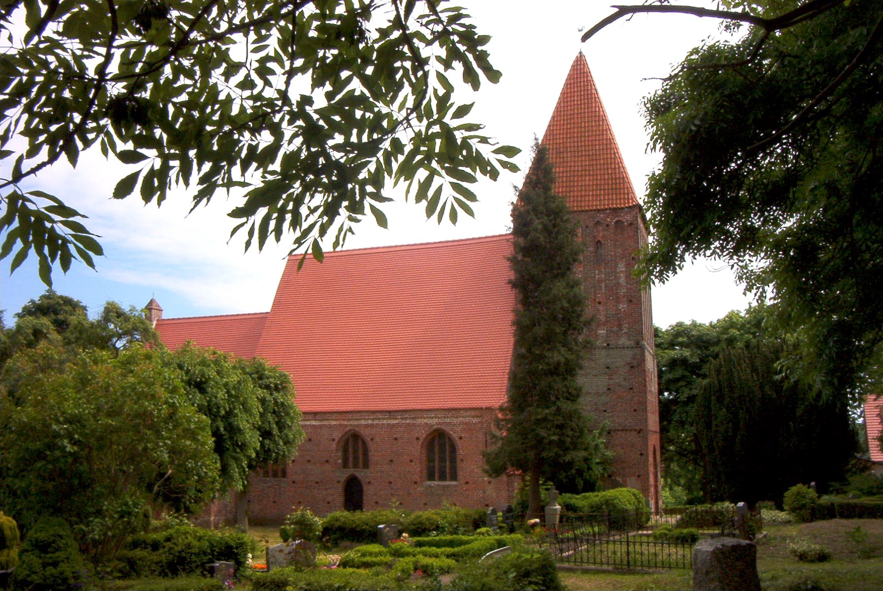 Sankt-Andreas-Kirche in Lancken-Granitz, Rügen, Deutschland